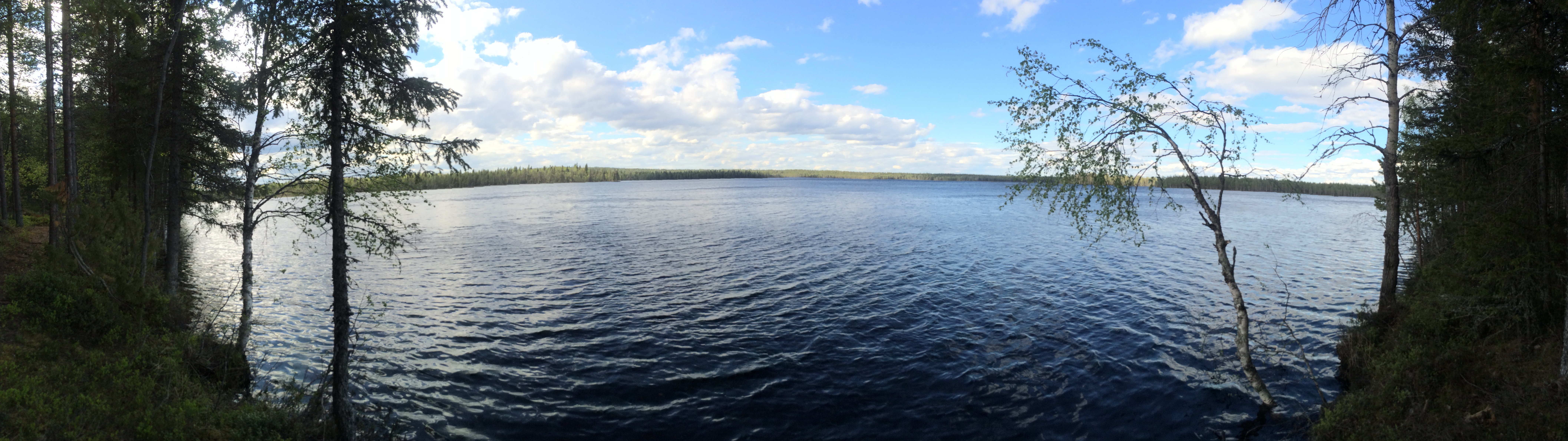 озеро Варакское